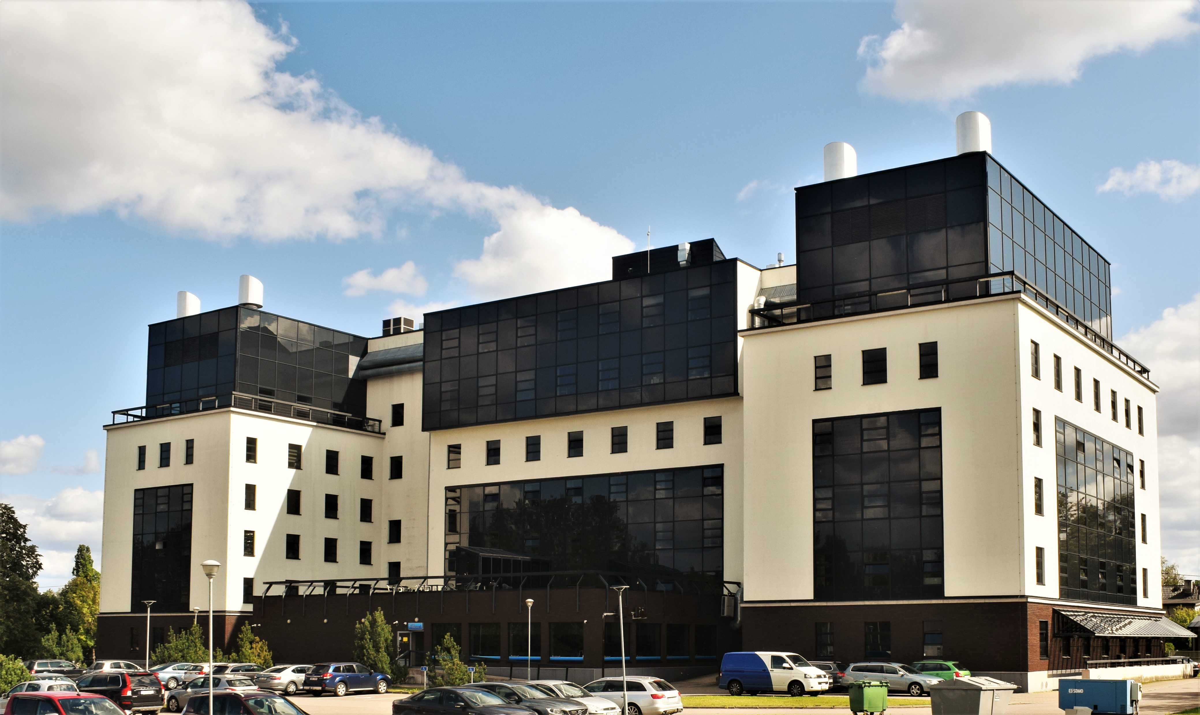 Tehnoloogiainstituut